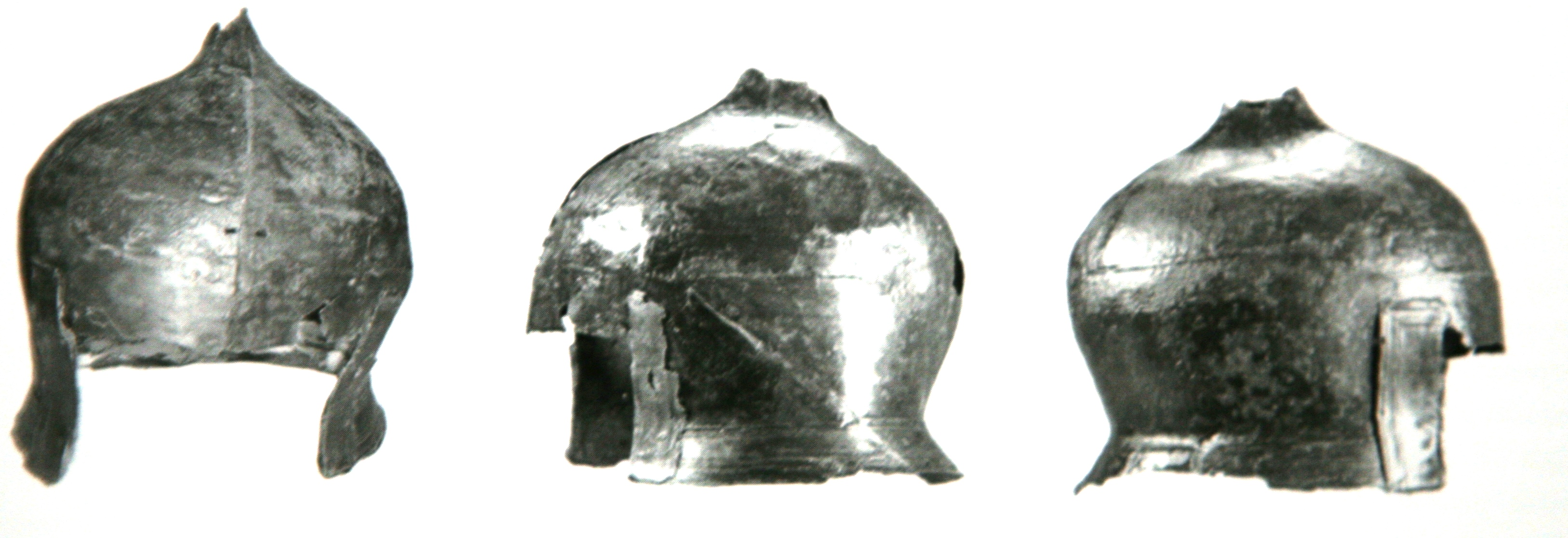 Tre proiezioni dell'Elmo di Polizzello esposto al Museo archeologico regionale di Caltanissetta